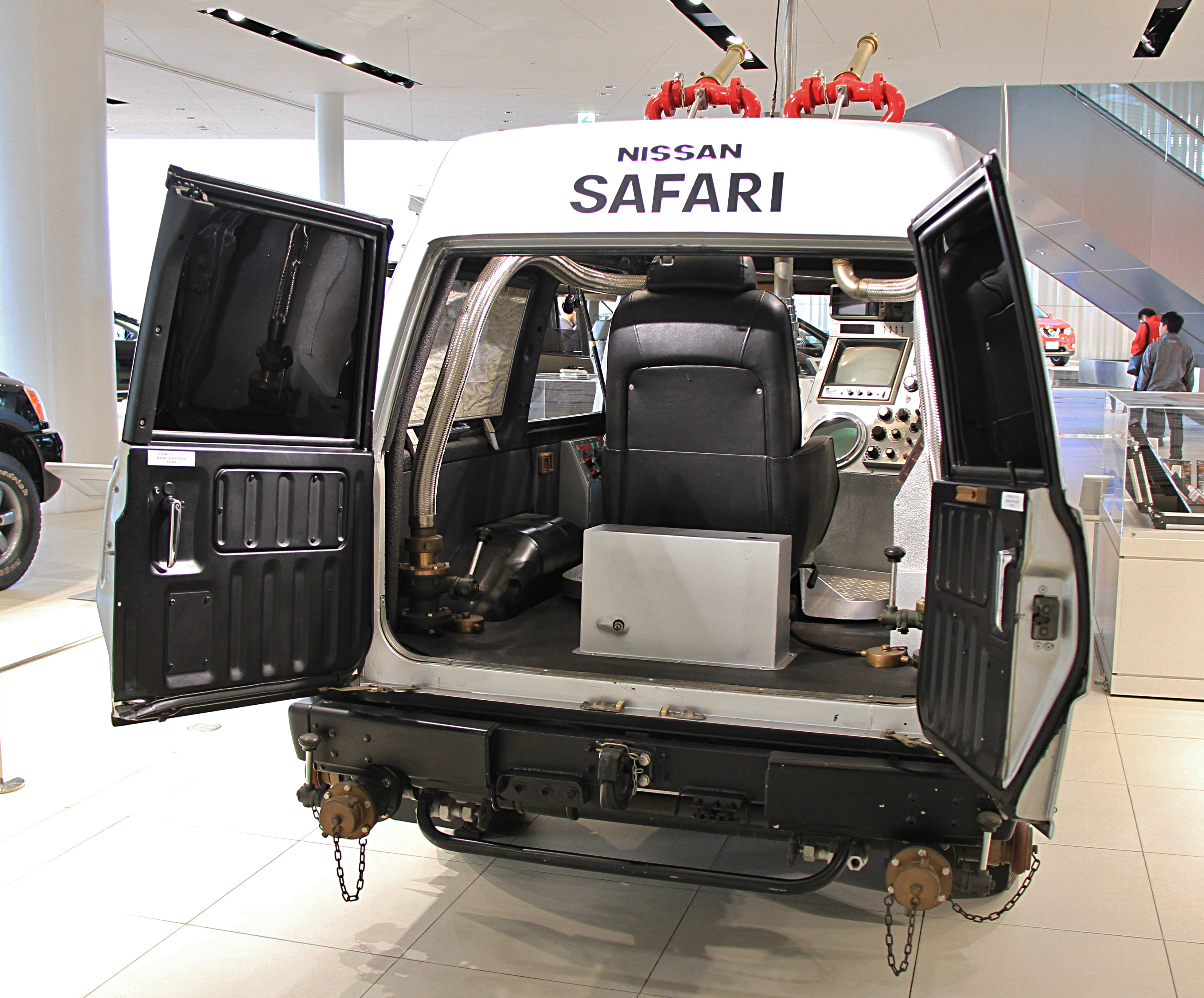 Nissan Safari